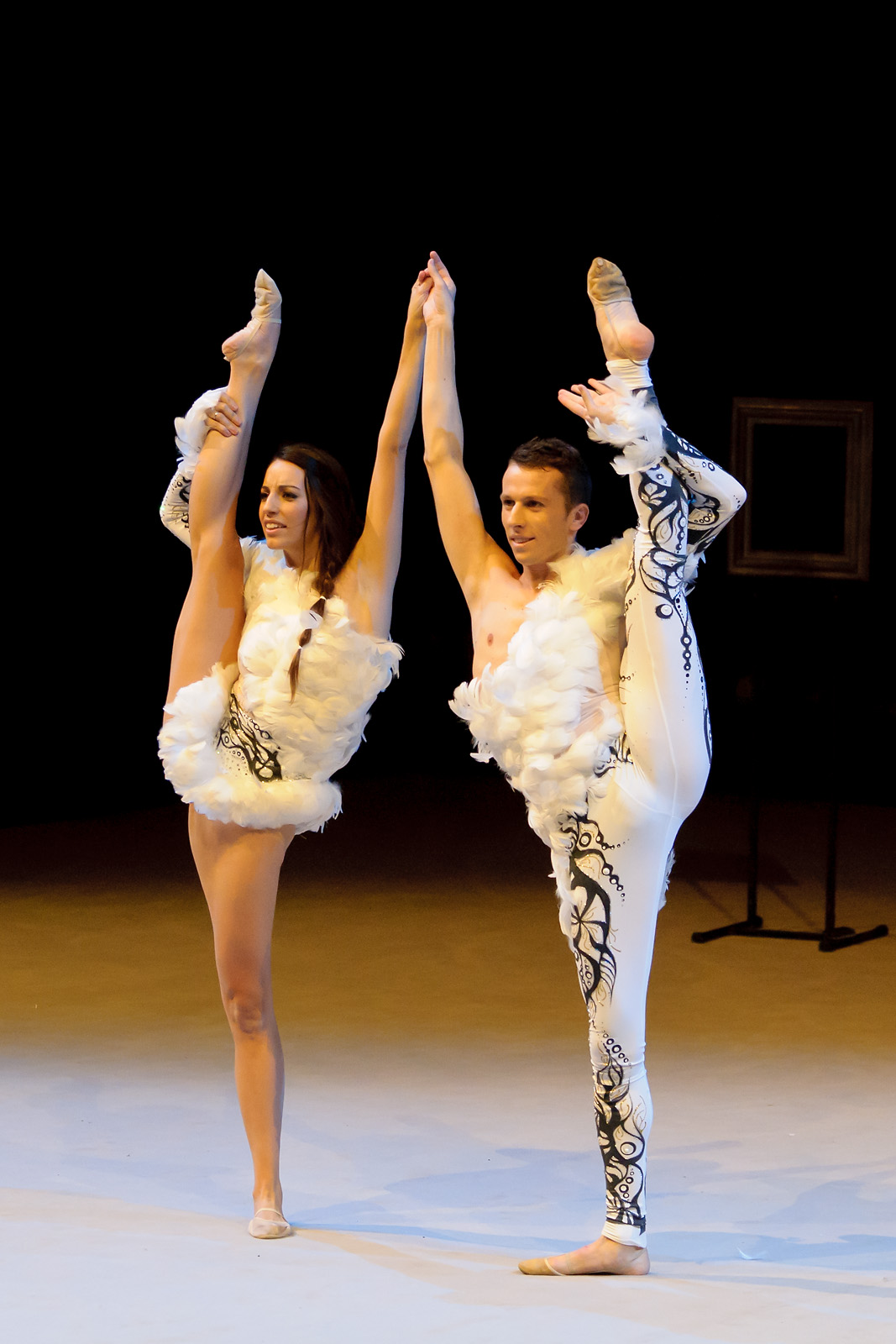 La exgimnasta rítmica Almudena Cid y el gimnasta rítmico Rubén Orihuela durante una exhibición en la Gala Euskalgym 2014, celebrada en el pabellón Buesa Arena de Vitoria el 8 de noviembre de 2014.Almudena Cid y Ruben Orihuela